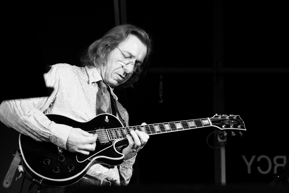 Claude Barthélémy en concert aux Chais de Bercy (Paris 12ème) avec le musicien palestinien Monein Adwan, le 6 octobre 2007